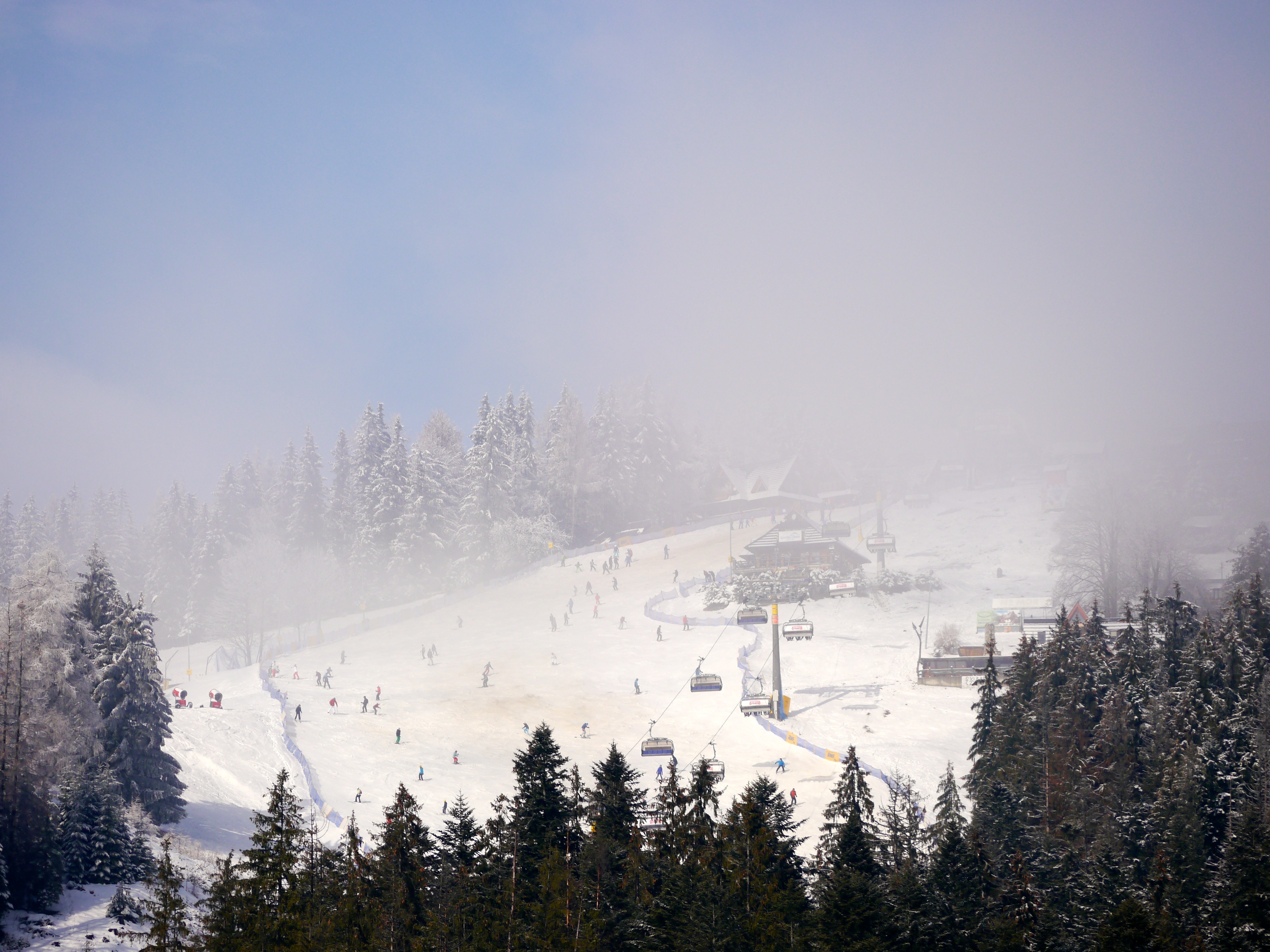 Zakopane